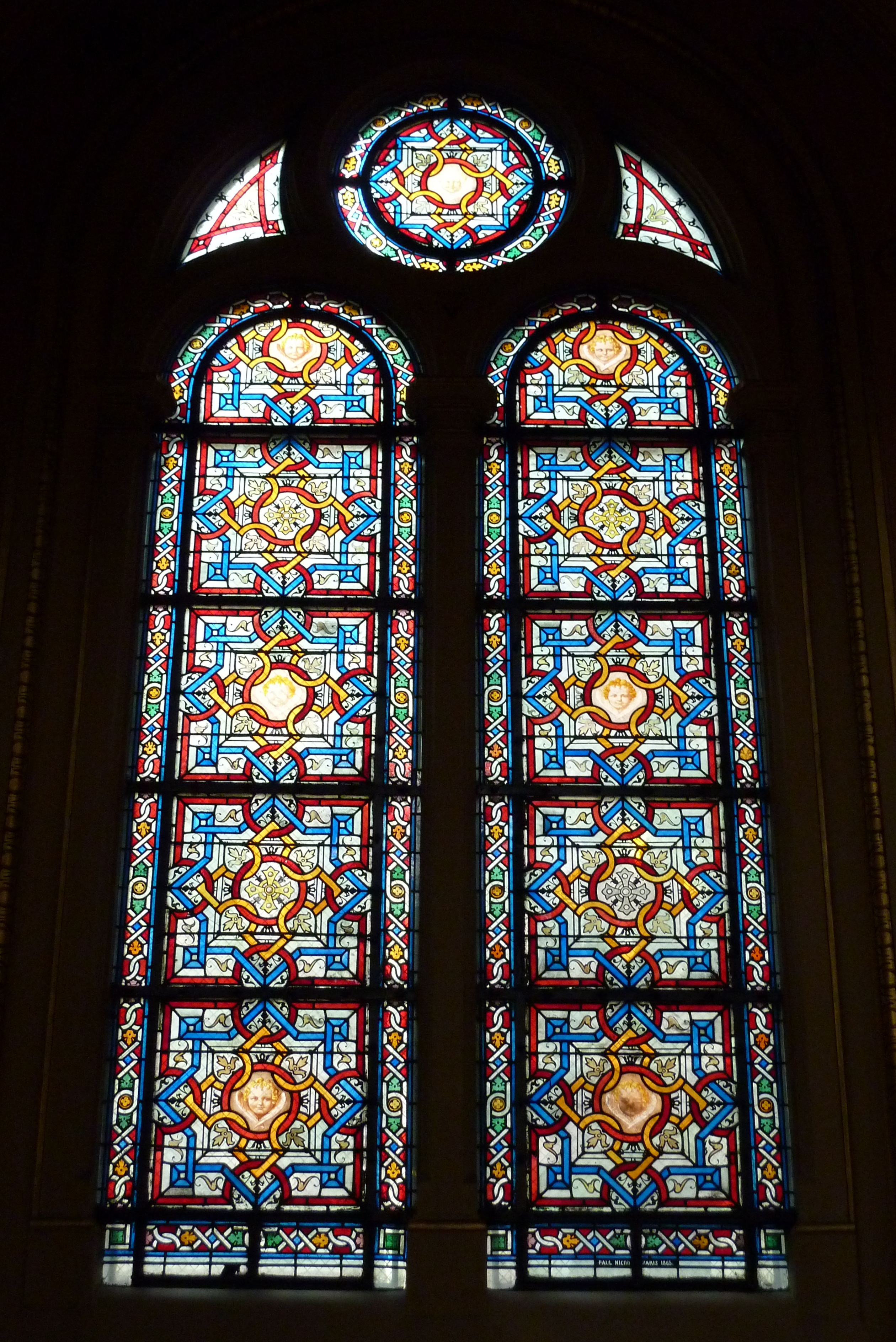 Bleiglasfenster (Seitenschiff) in der Kirche Sainte-Trinité in Paris, Darstellung: Ornament, unten Signatur Paul Nicod